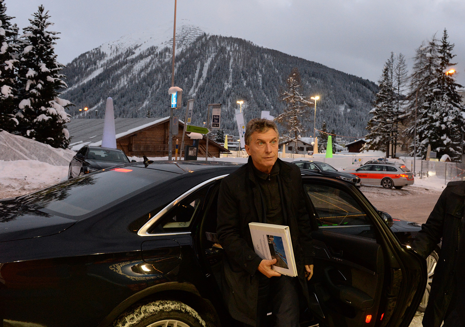 Macri arribando a el World Economic Forum 2016 en la ciudad suiza de Davos